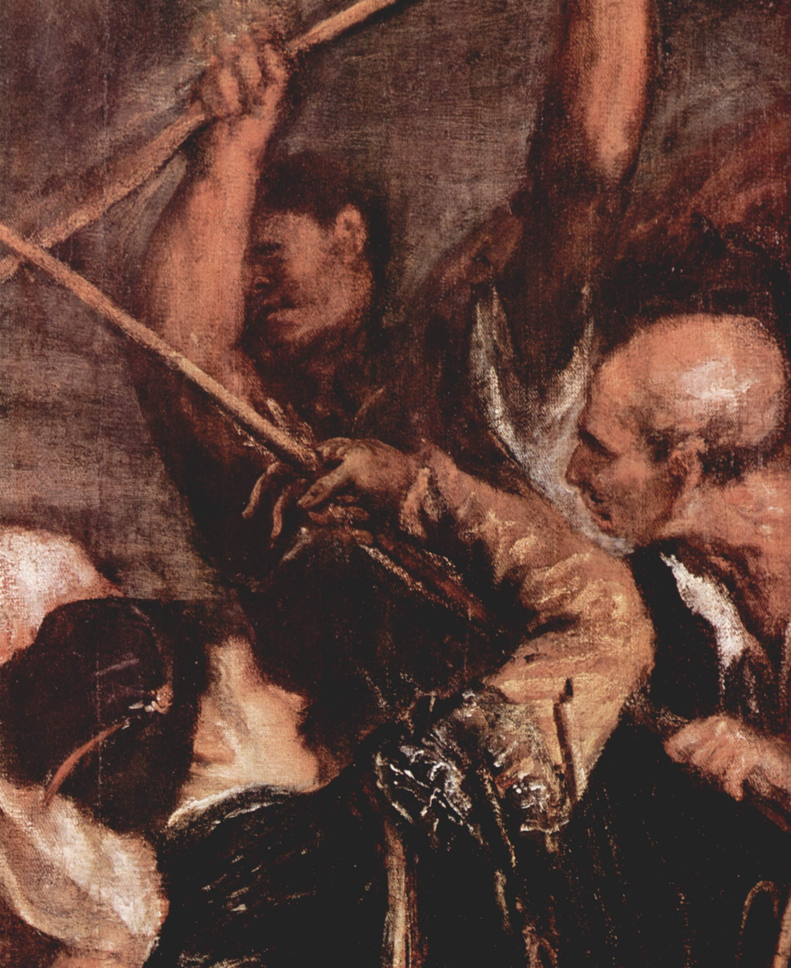 detail